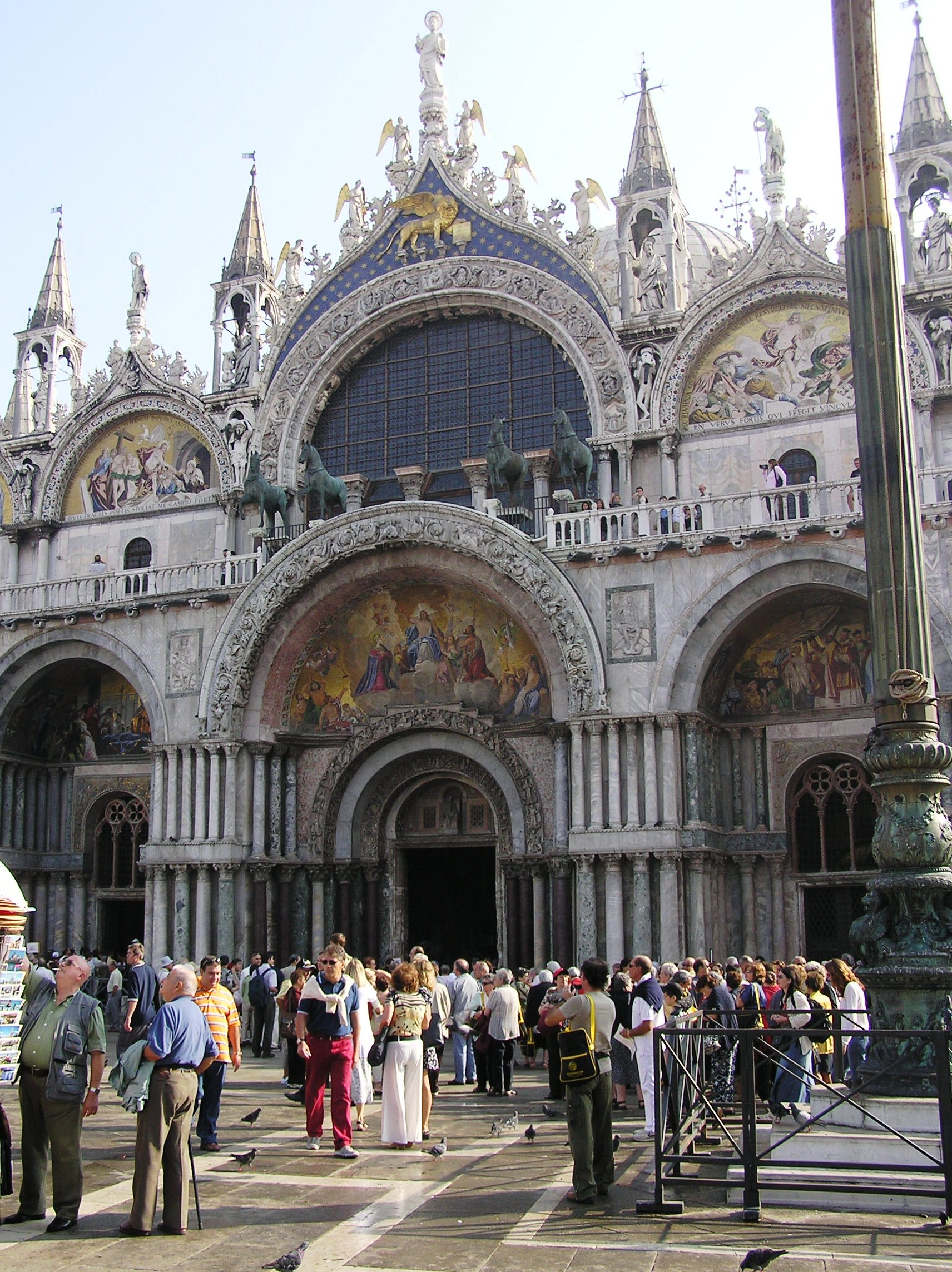 Benátky - Chrám sv. Marka